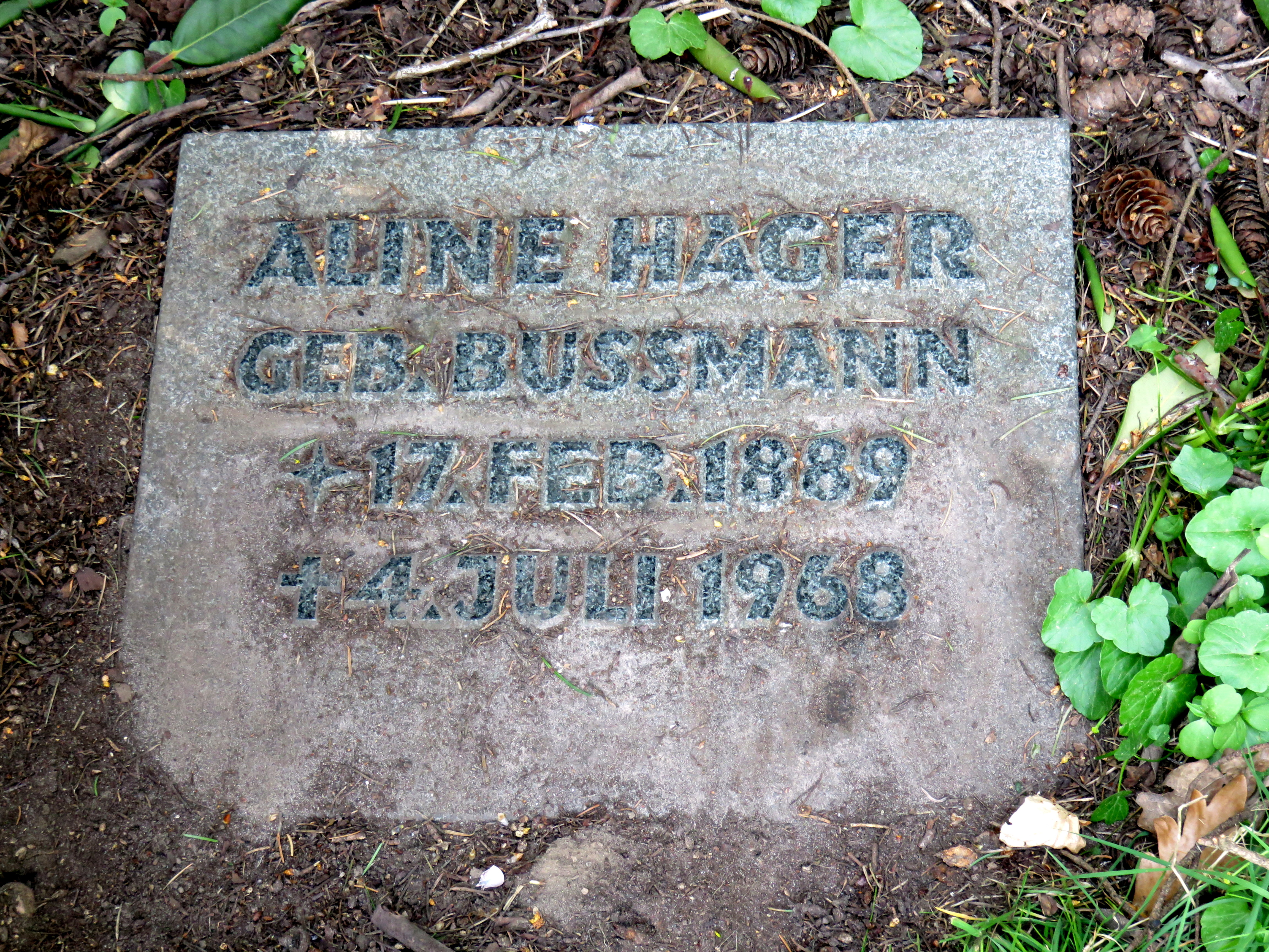 Kissenstein der deutschen Schauspielerin und Publizistin Aline Bußmann auf der Familiengrabstätte Hager, Friedhof Ohlsdorf, Planquadrat P29-379-388 (nördlich Kapelle 10). Sie gilt als Muse des deutschen Schriftstellers Gorch Fock und war Mentorin für den deutschen Schriftsteller Wolfgang Borchert.